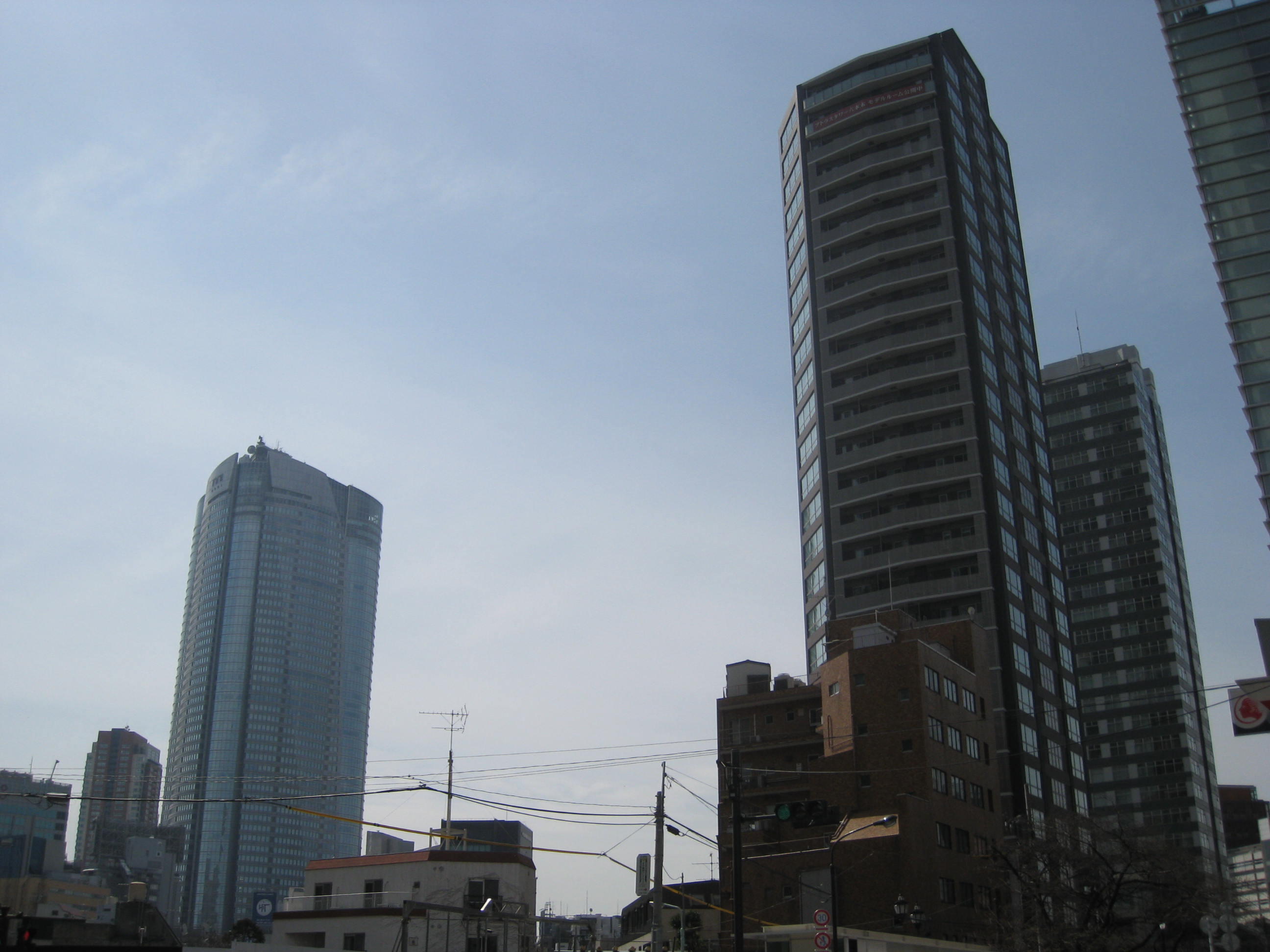 アトラスタワー六本木と六本木ヒルズ